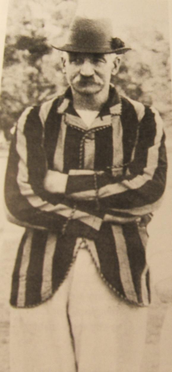 George Giffen